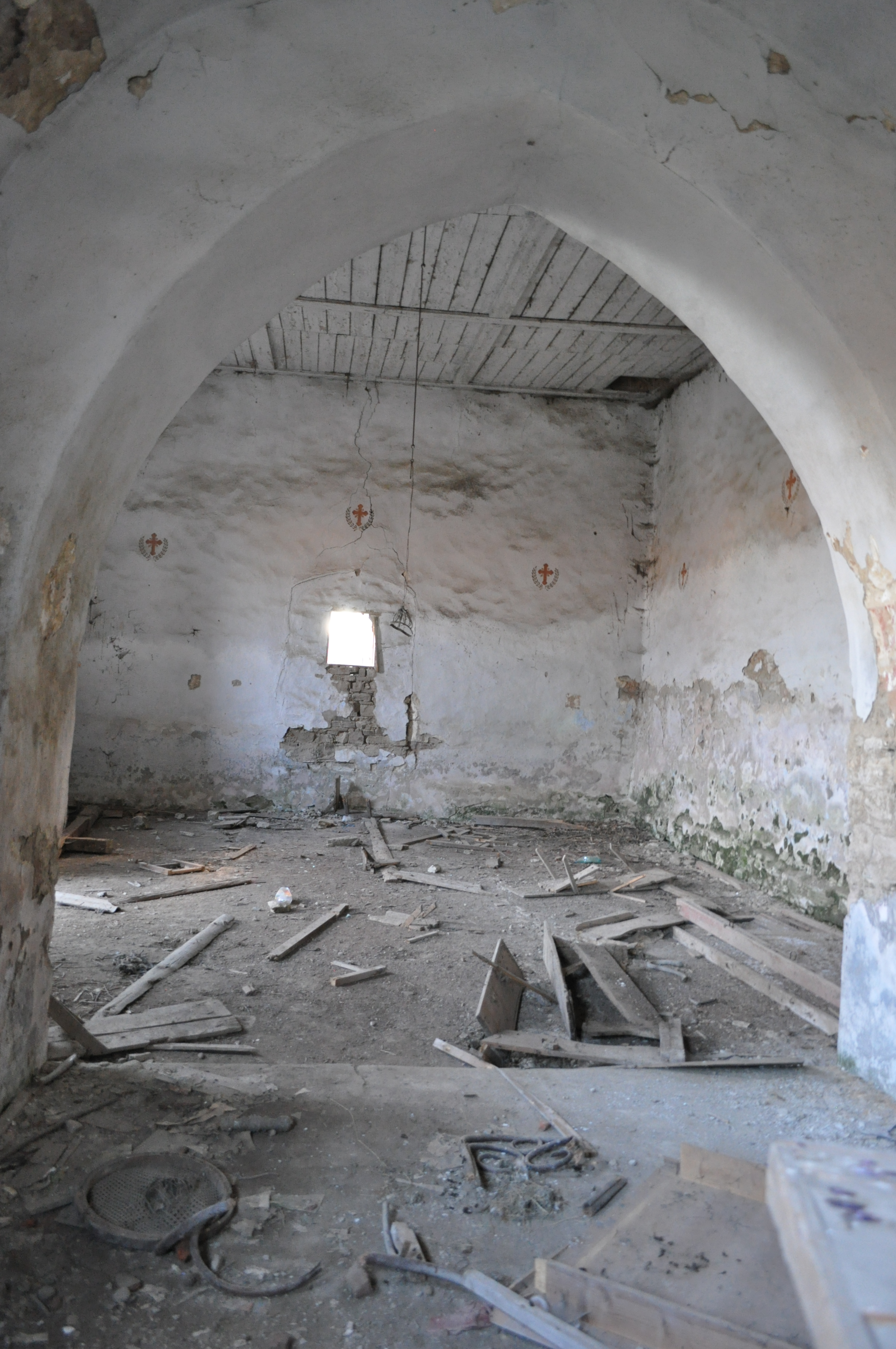 Biserica evanghelică, sat CORVINEŞTI; comuna MATEI 01